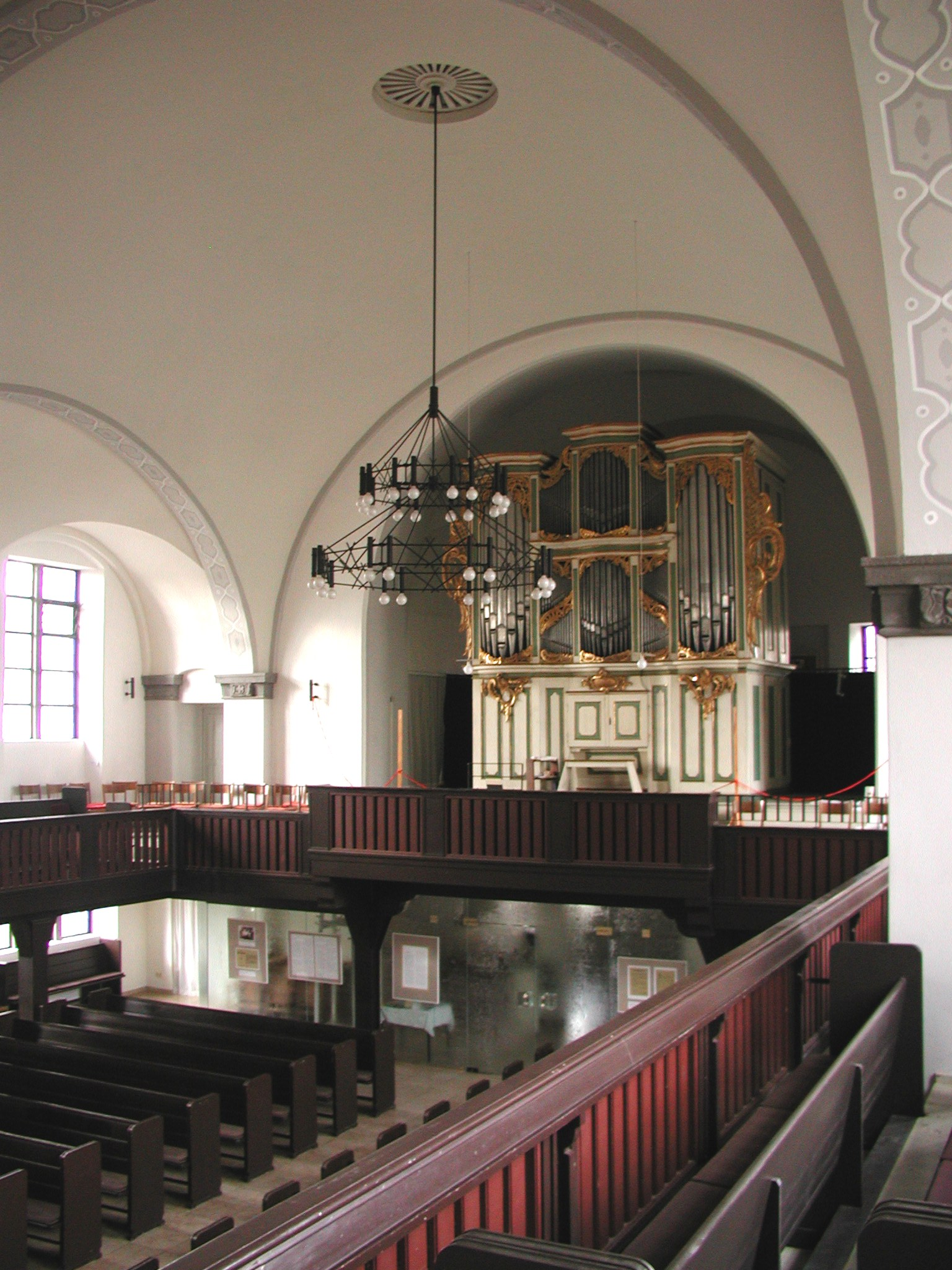 Die Amalienorgel in der Kirche "Zur frohen Botschaft"